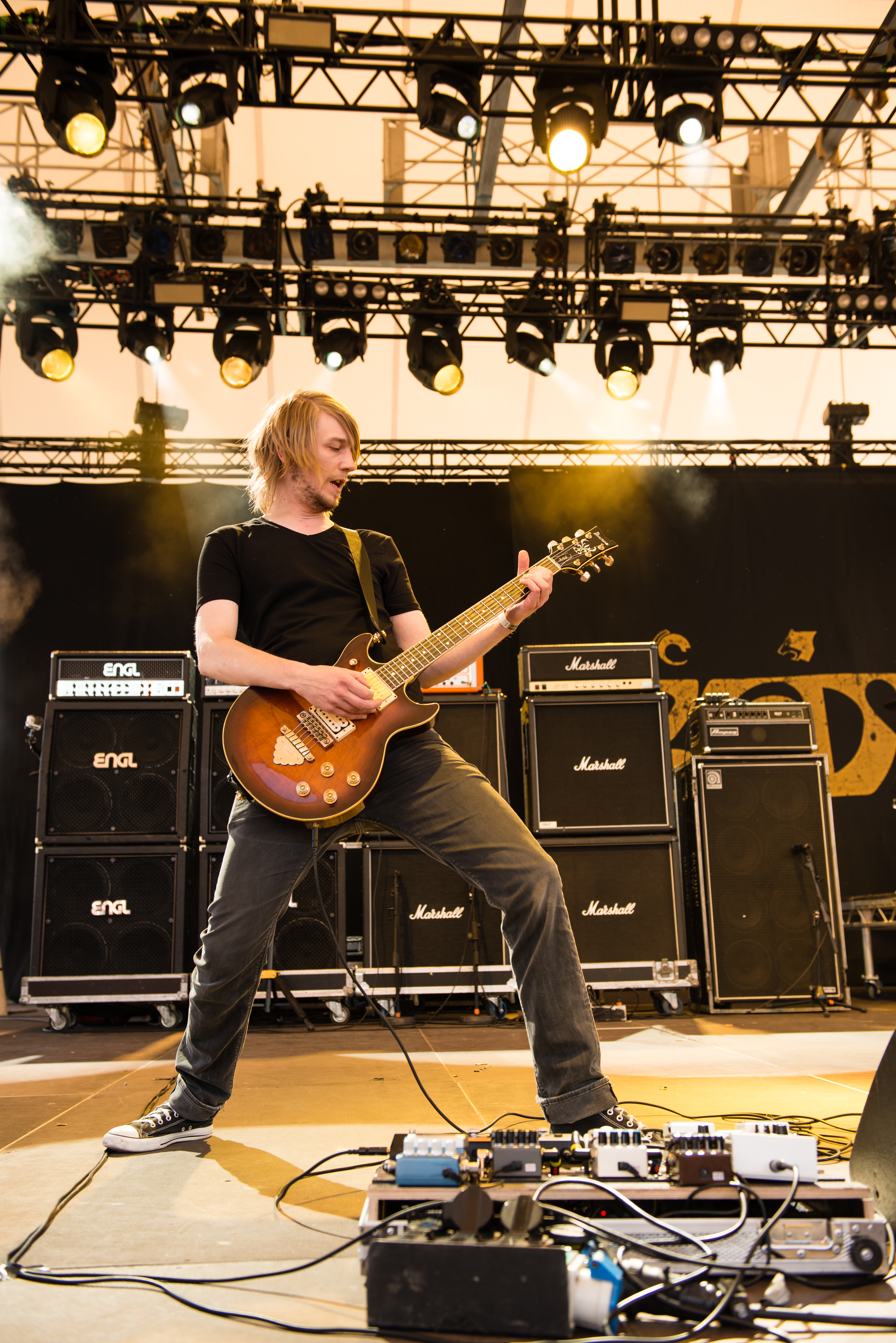 'Rock Hard Festival 2014 - Gelsenkirchen': 'Zodiac'